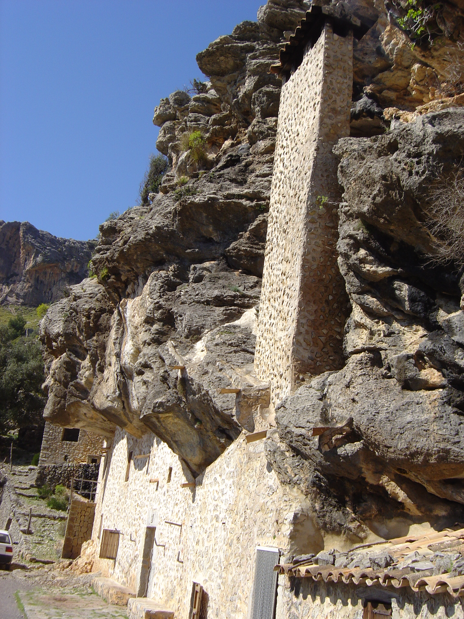 Possessió de Cosconar, al peu del Puig Roig. Escorca. Mallorca.